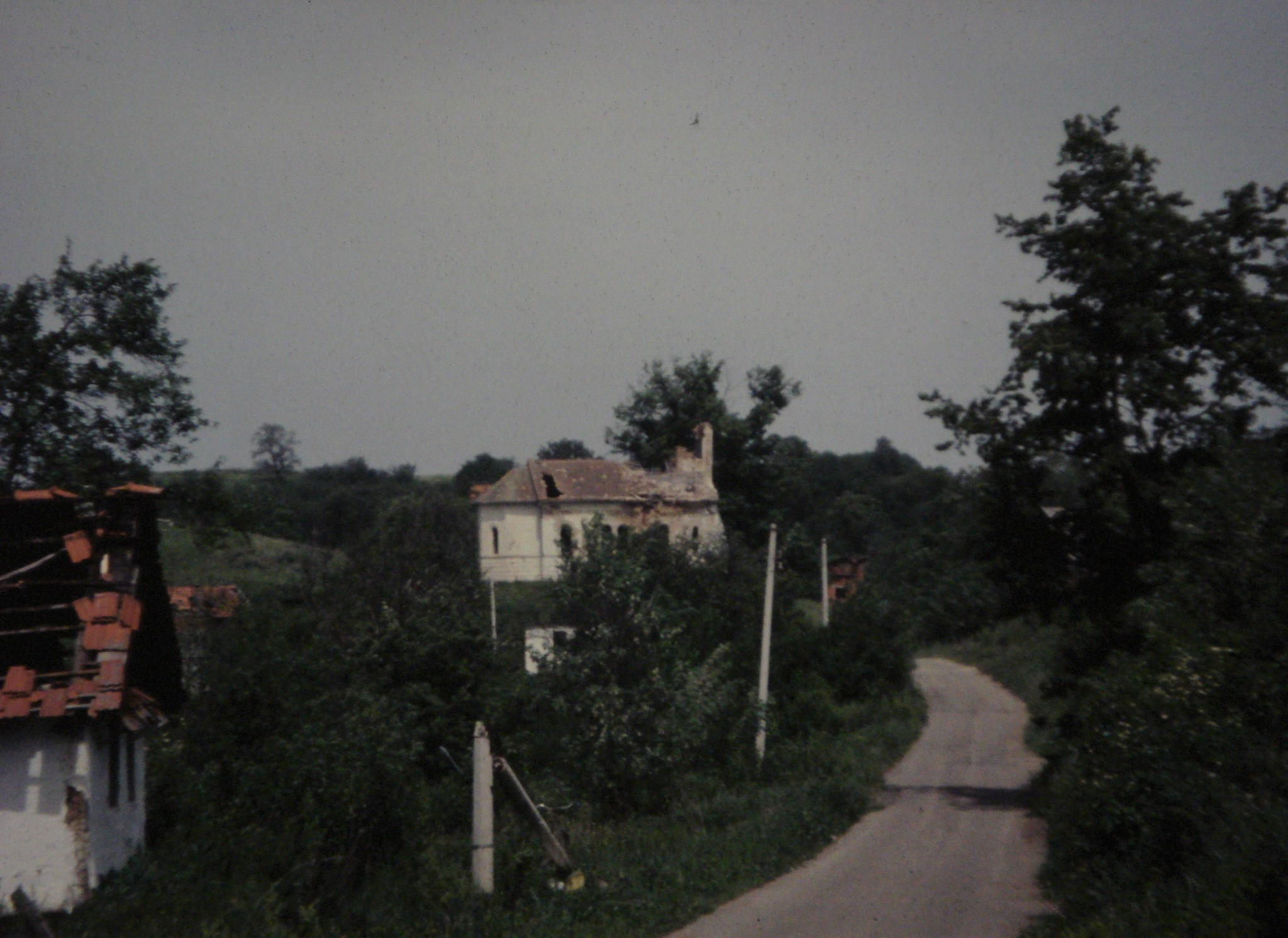 Iglesia de Subocka. Destruida por los combates de 1991. Toma a mediados de 1994.